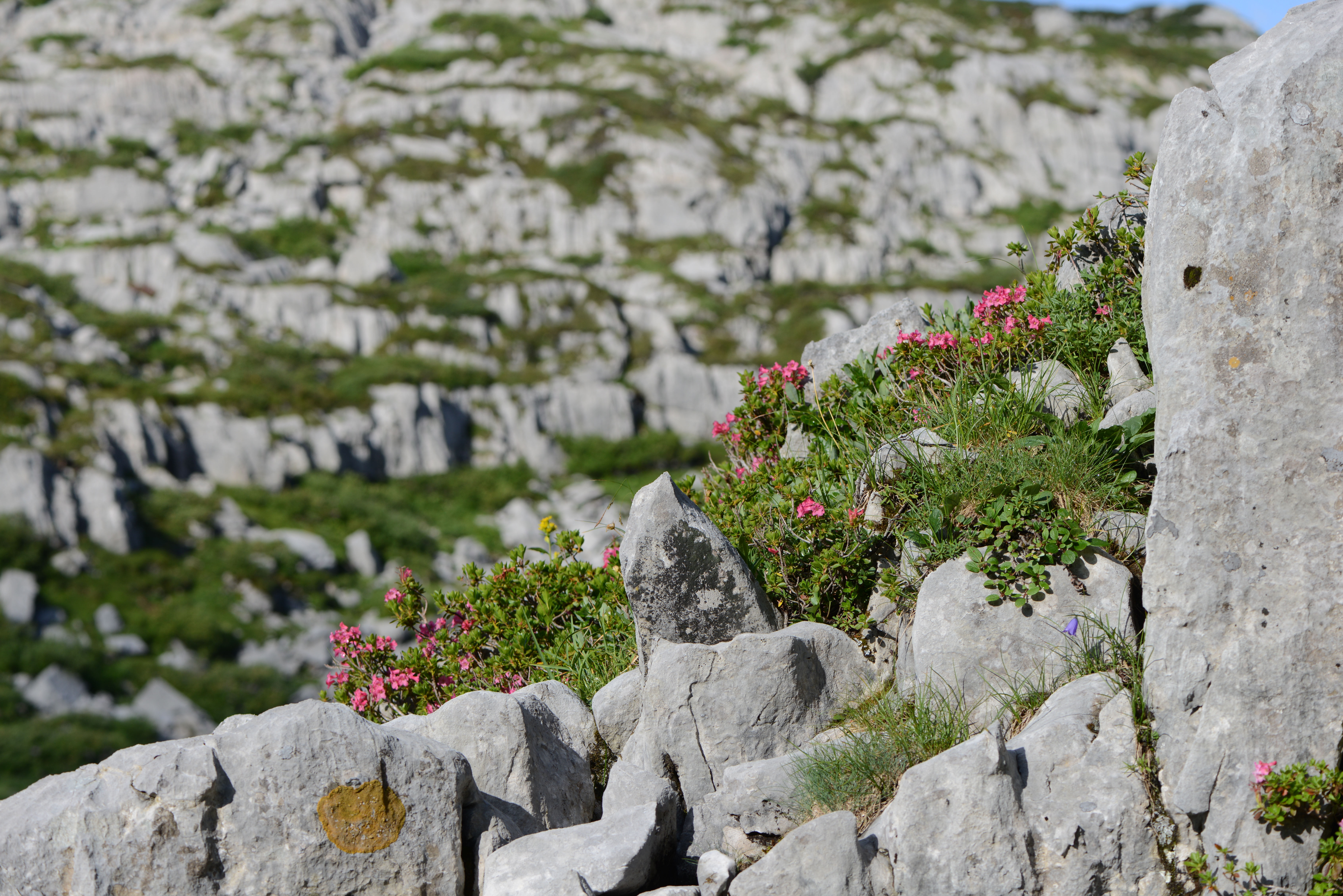 Das Steinerne Meer ist eine alpine Karsthochfläche im Lechquellengebirge am Formaletsch (2.292 m) bei Lech in Vorarlberg.